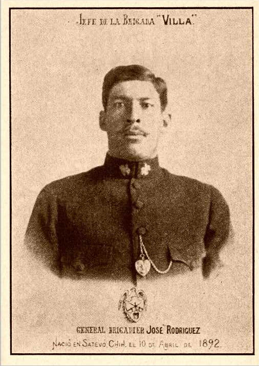 General José Rodríguez